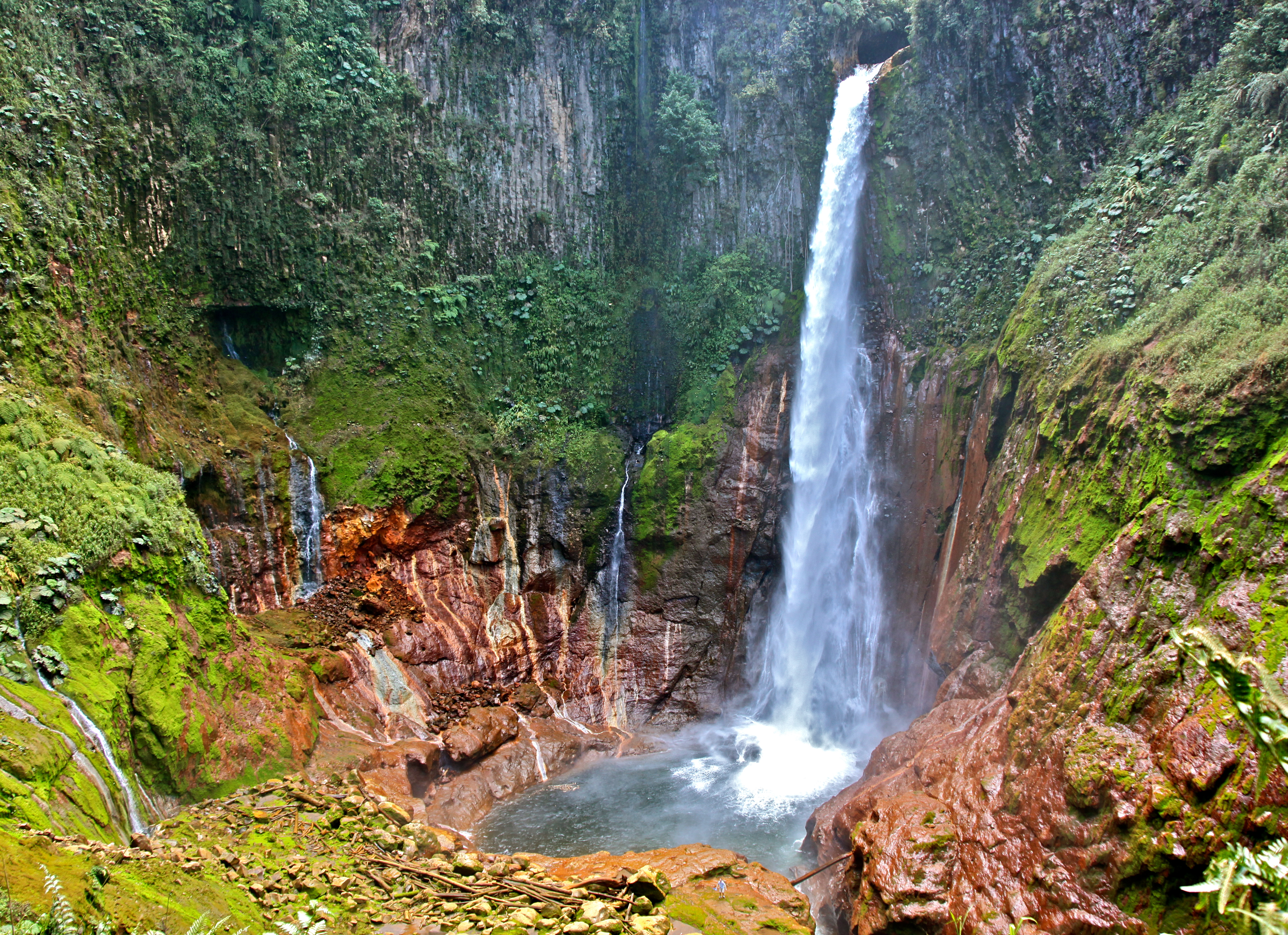 La catarata del Toro es un salto de agua de 90 m de altura ubicado en Costa Rica.